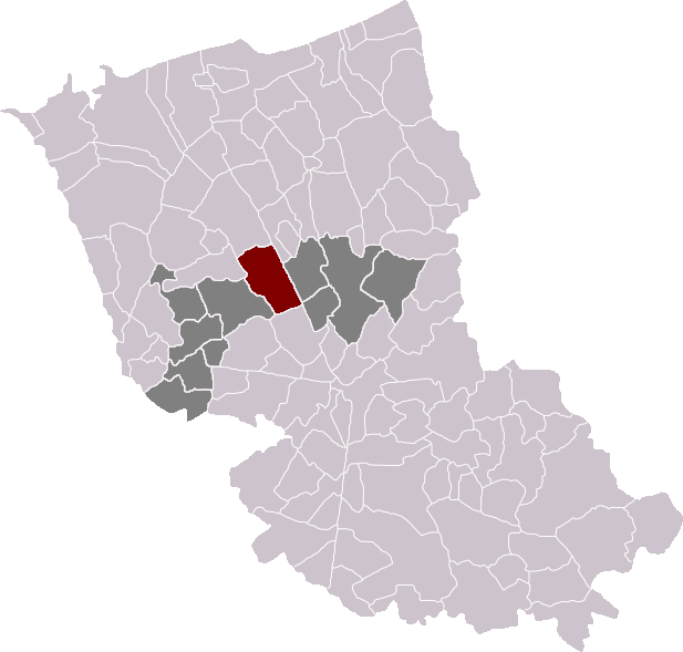 Locatie gemeente Zegerskappel in arrondissement Duinkerke. Zelfgemaakt. Location of Zegerscappel municipality in the arrondissement of Dunkirk. Self made. Localisation de la commune de Zegerscappel dans l'arrondissement de Dunkerque. Fait moi-même.